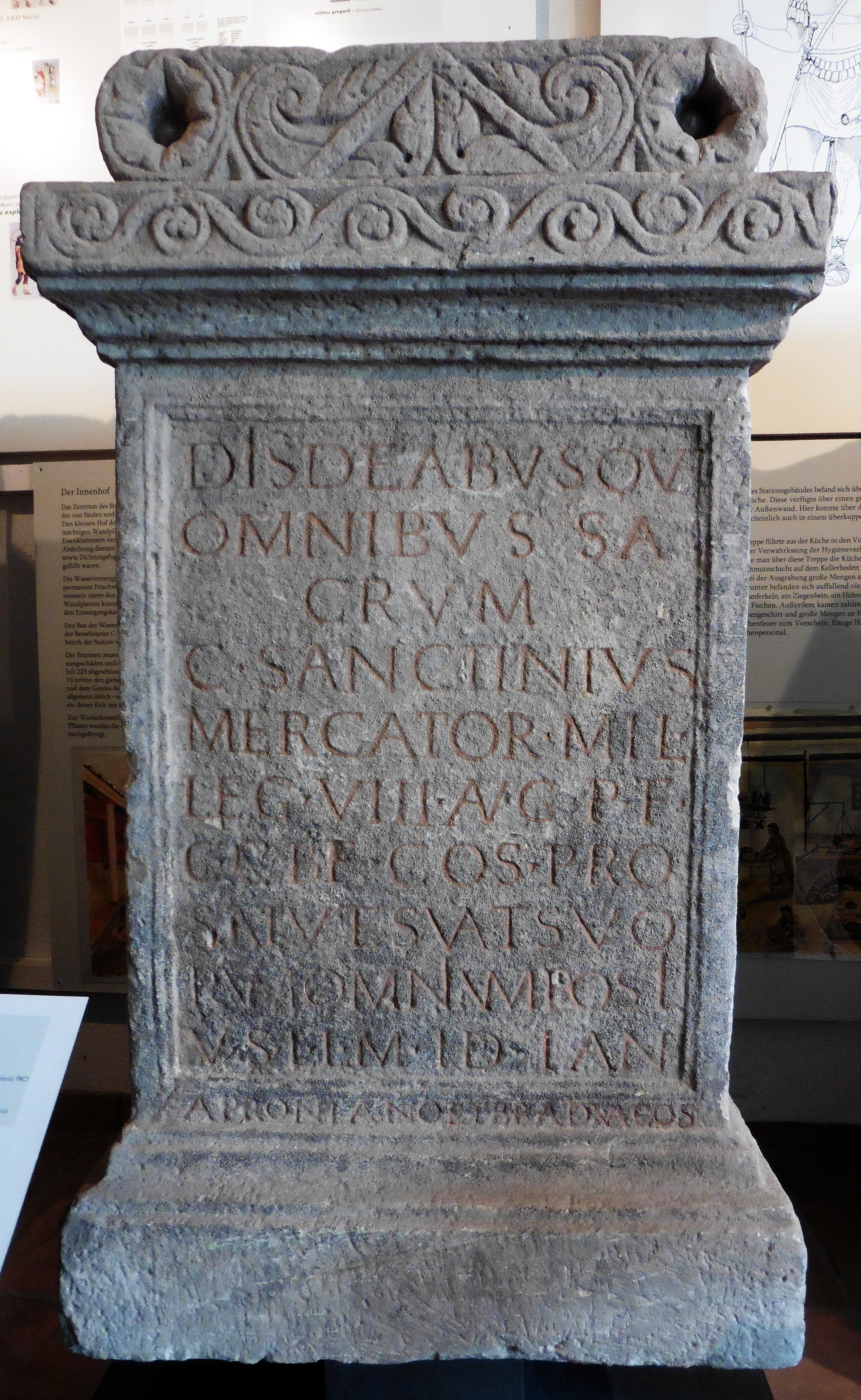 AE 1957, 0052 Di(i)s deabusque omnibus sa crum C(aius) Sanctinius Mercator mil(es) leg(ionis) VIII Aug(ustae) p(iae) f(idelis) c(onstantis) C(ommodae) b(ene)f(iciarius) co(n)s(ularis) pro salute sua et suo rum omnium pos(u)it v(otum) s(olvit) l(aetus) l(ibens) m(erito) Id(ibus) Ian(uariis) Aproniano et Bradua co(n)s(ulibus)